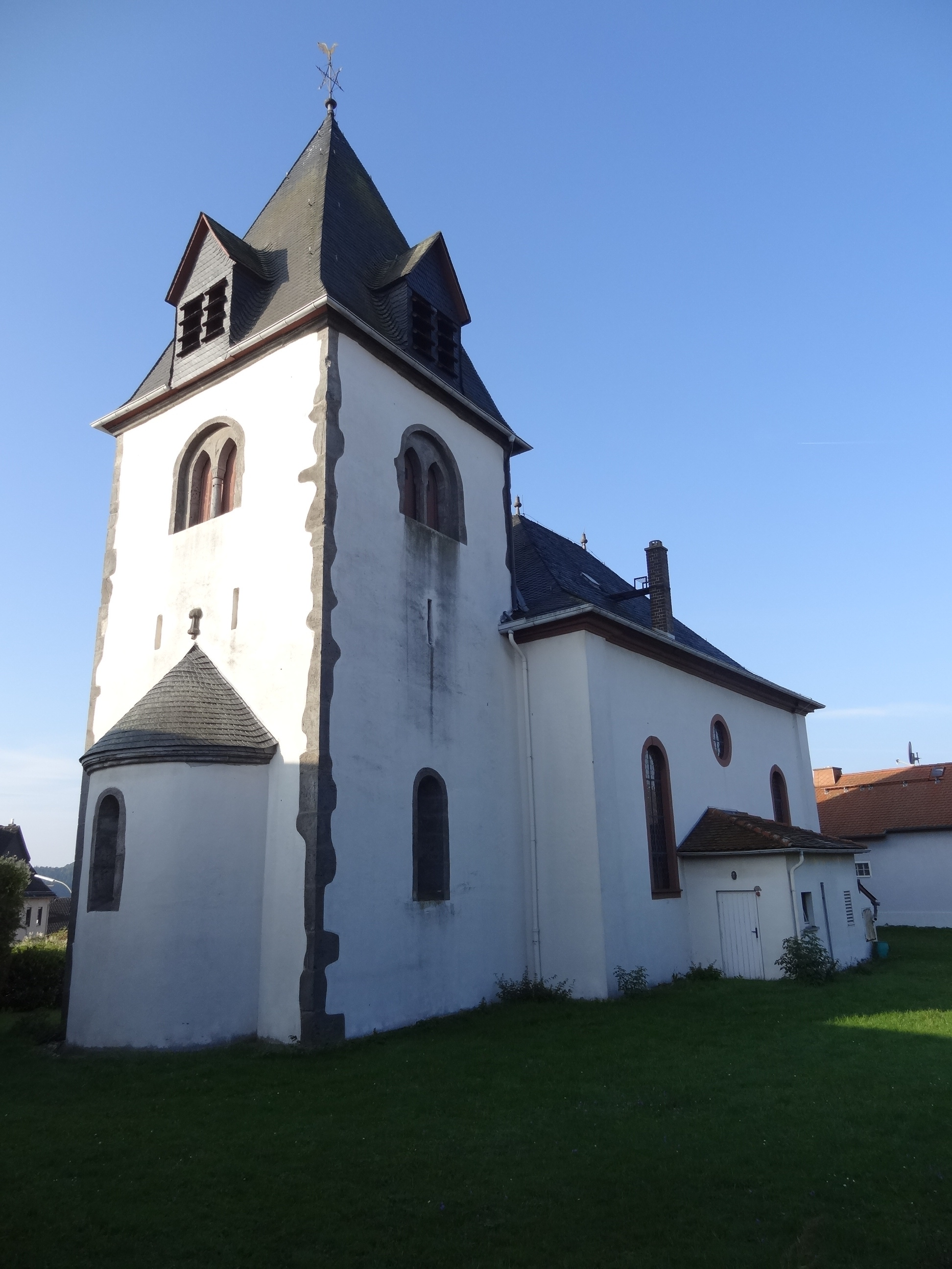 Evangelische Kirche Bettenhausen (Lich)